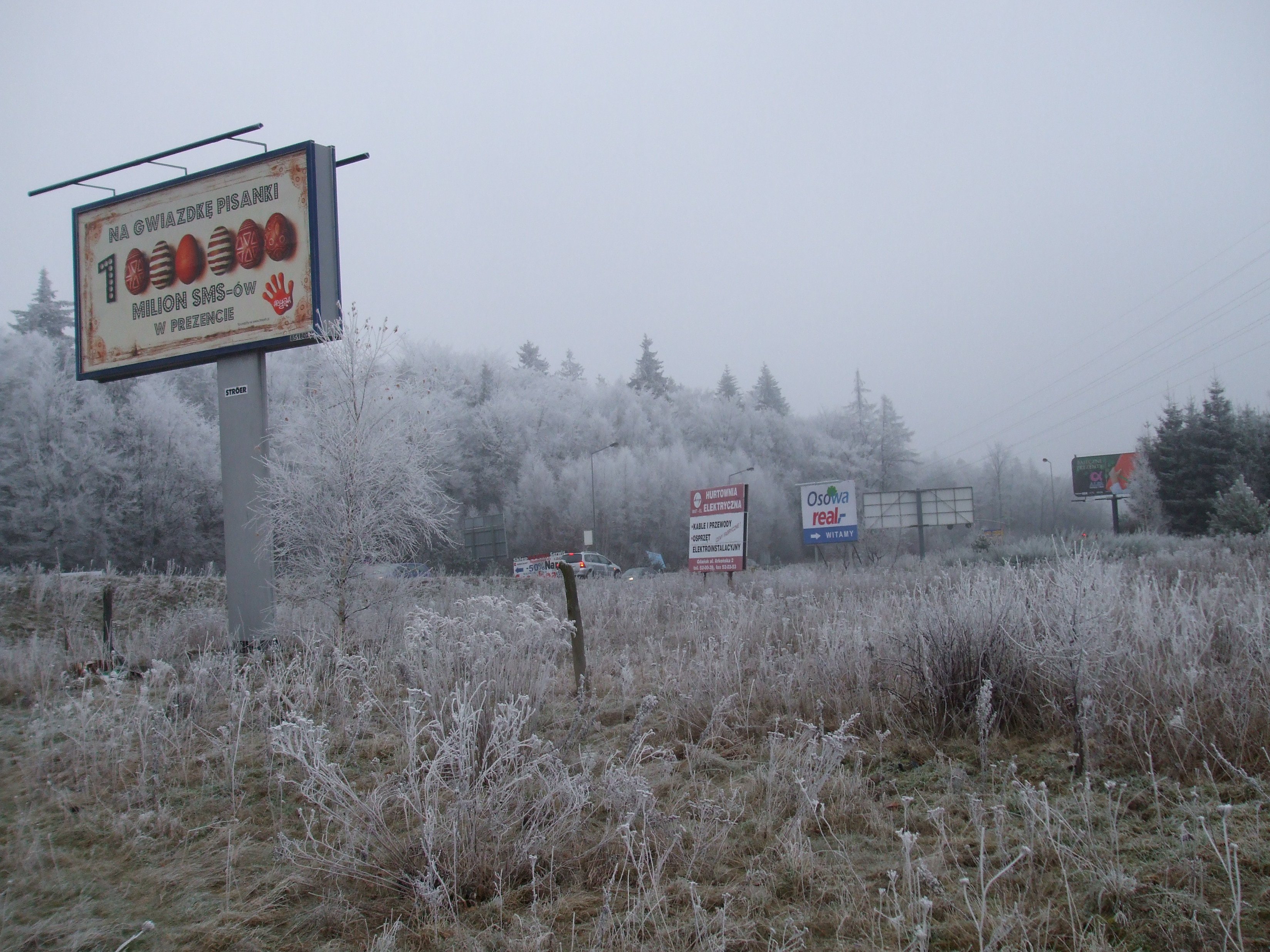 Gdańsk Osowa przy ul. Spacerowej i mróz, w tle Lasy Sopockie.